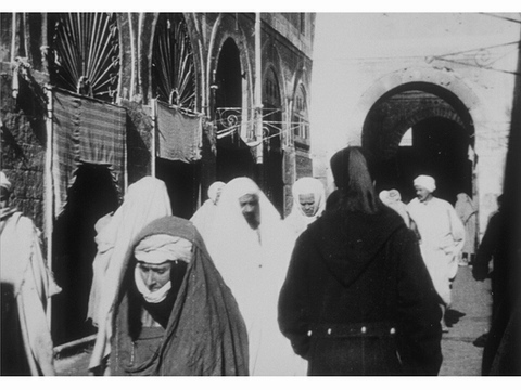 Souk El Bey en 1920